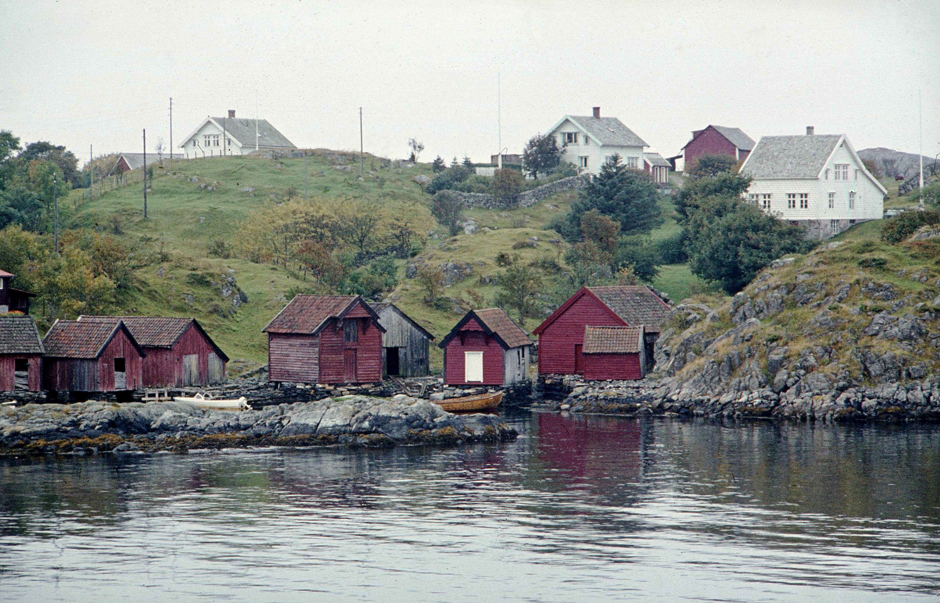 Sjøhus på Krossøy, fotografert 1974.